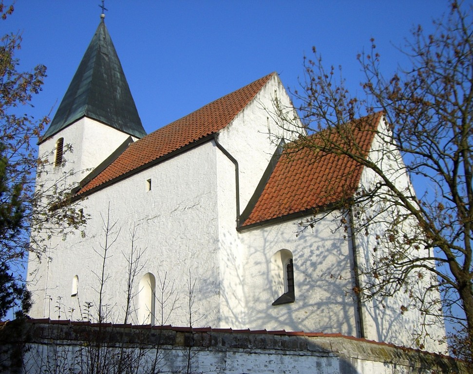 St. Johann Baptist in Rinkam bei Straubing